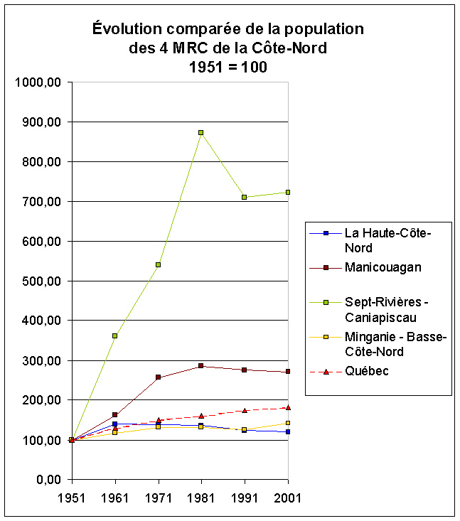 Évolution comparée de la population des 4 MRC de la Côte-Nord, au Québec. 1951 = 100. Données Statistiques : recensements du Canada. Compilation : Nicolas Gagnon